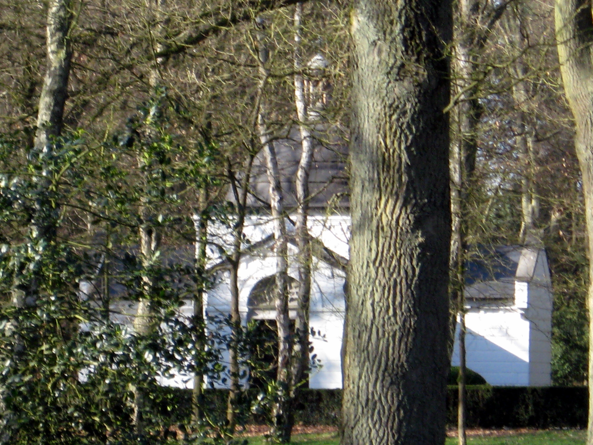 Grafkapel Masy in Houthalen